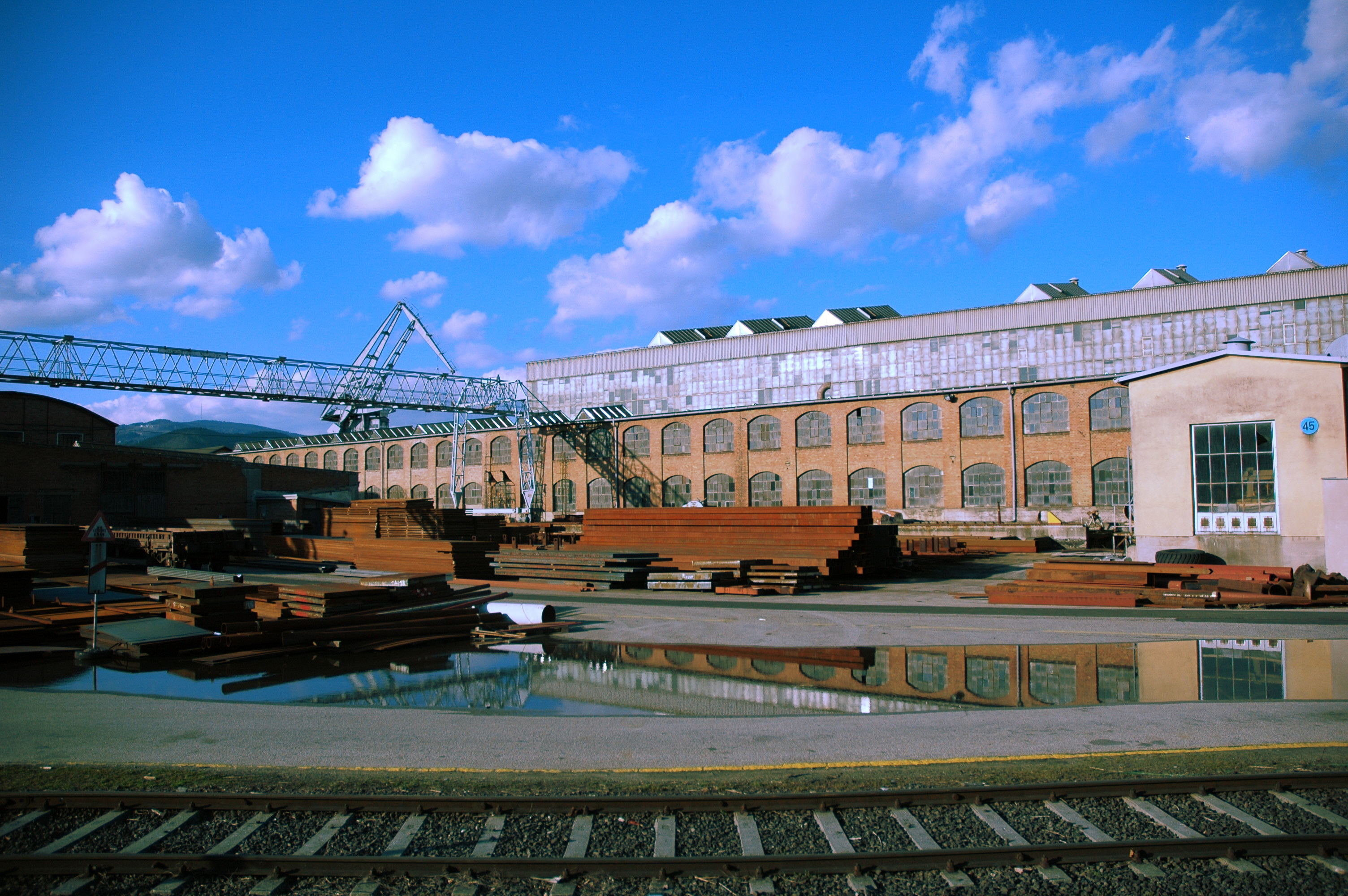 Alte (im Vordergrund) und neue Schiffbauhalle der ÖSWAG-Werft in Linz.